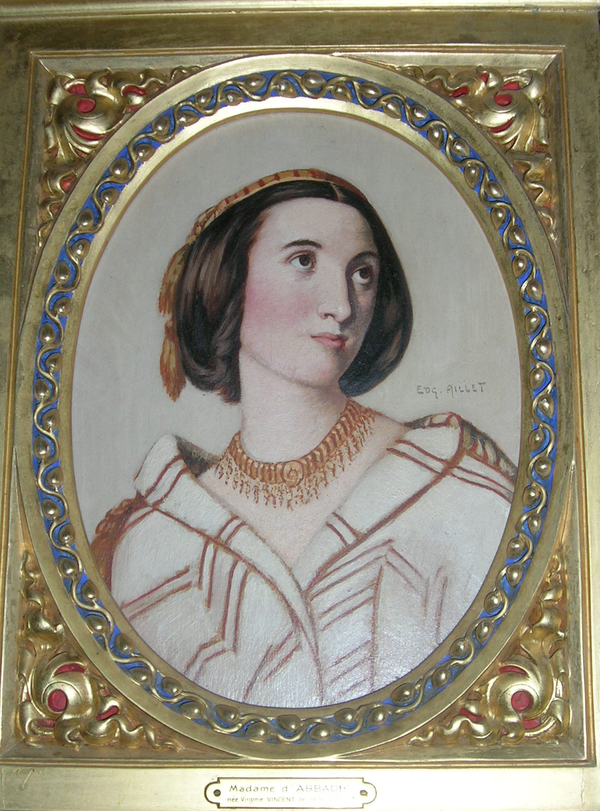 Virginie Vincent de Sain-Bonnet, wife of Antoine d'Abbadie